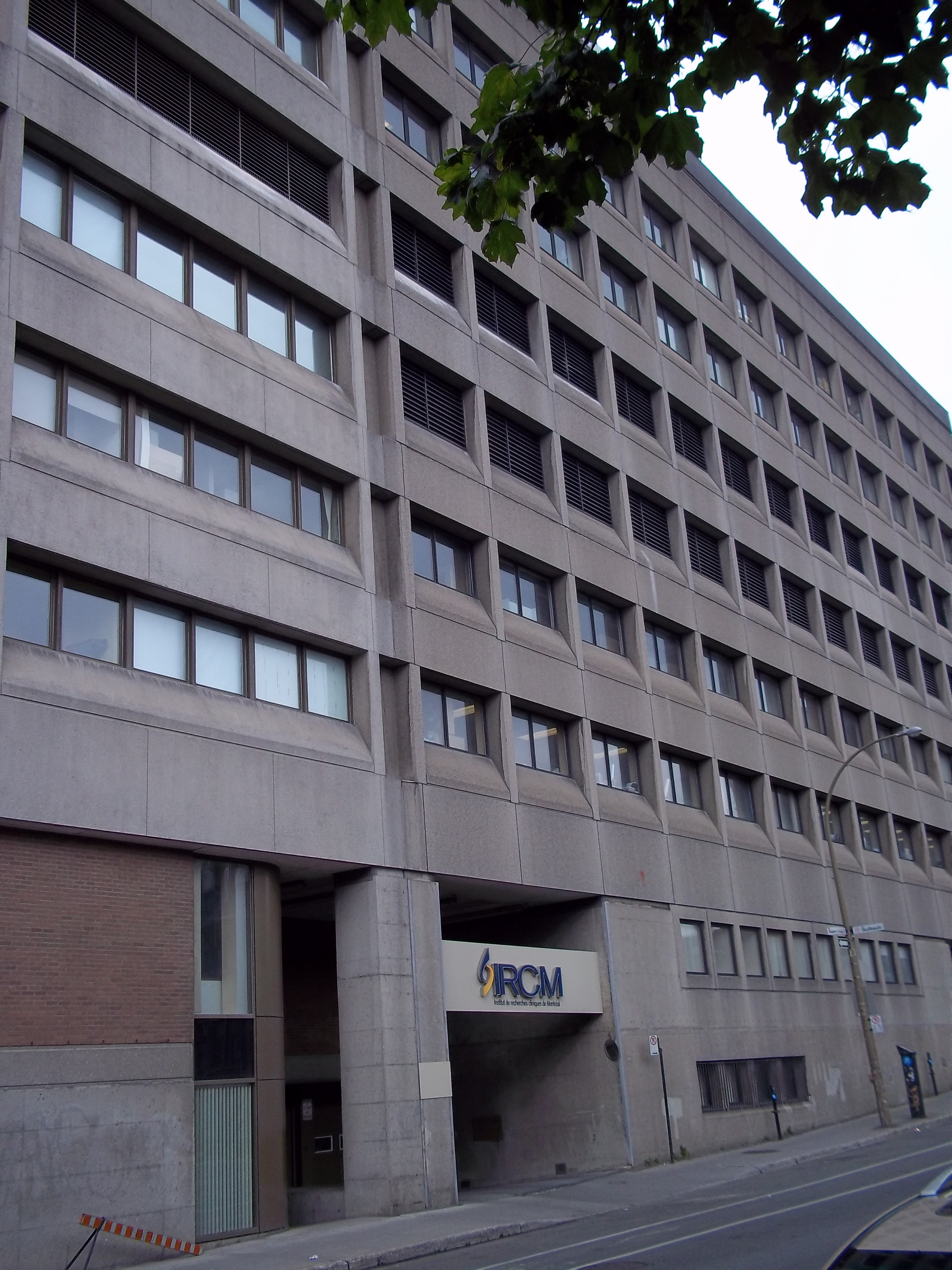 Institut de recherches cliniques de Montréal, vu du côté de la rue Saint-Urbain. Sa façade est au 110, avenue des Pins Ouest, Montréal